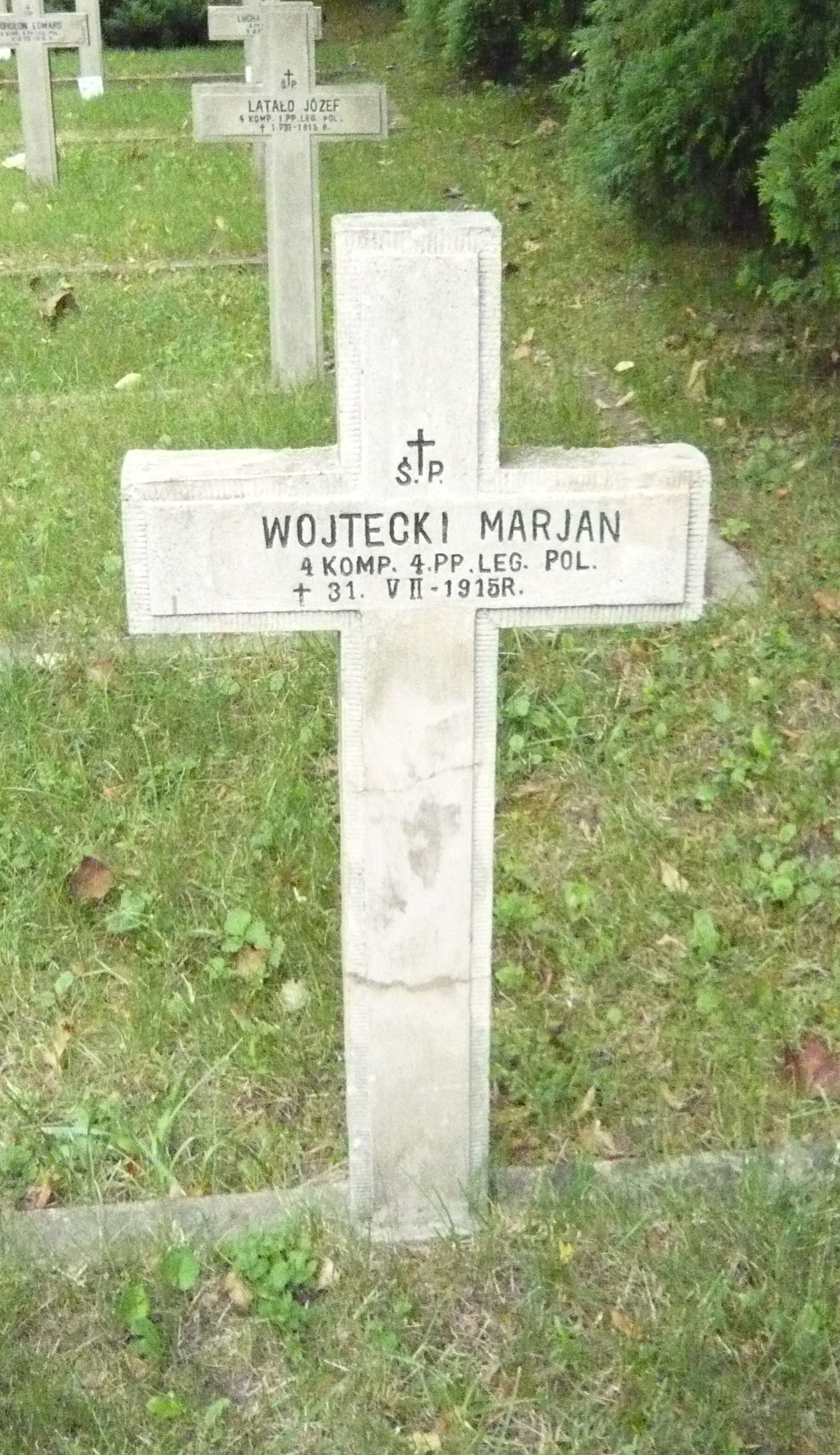 Grób Marjana Wojteckiego na Cmentarzu Legionistów w Jastkowie